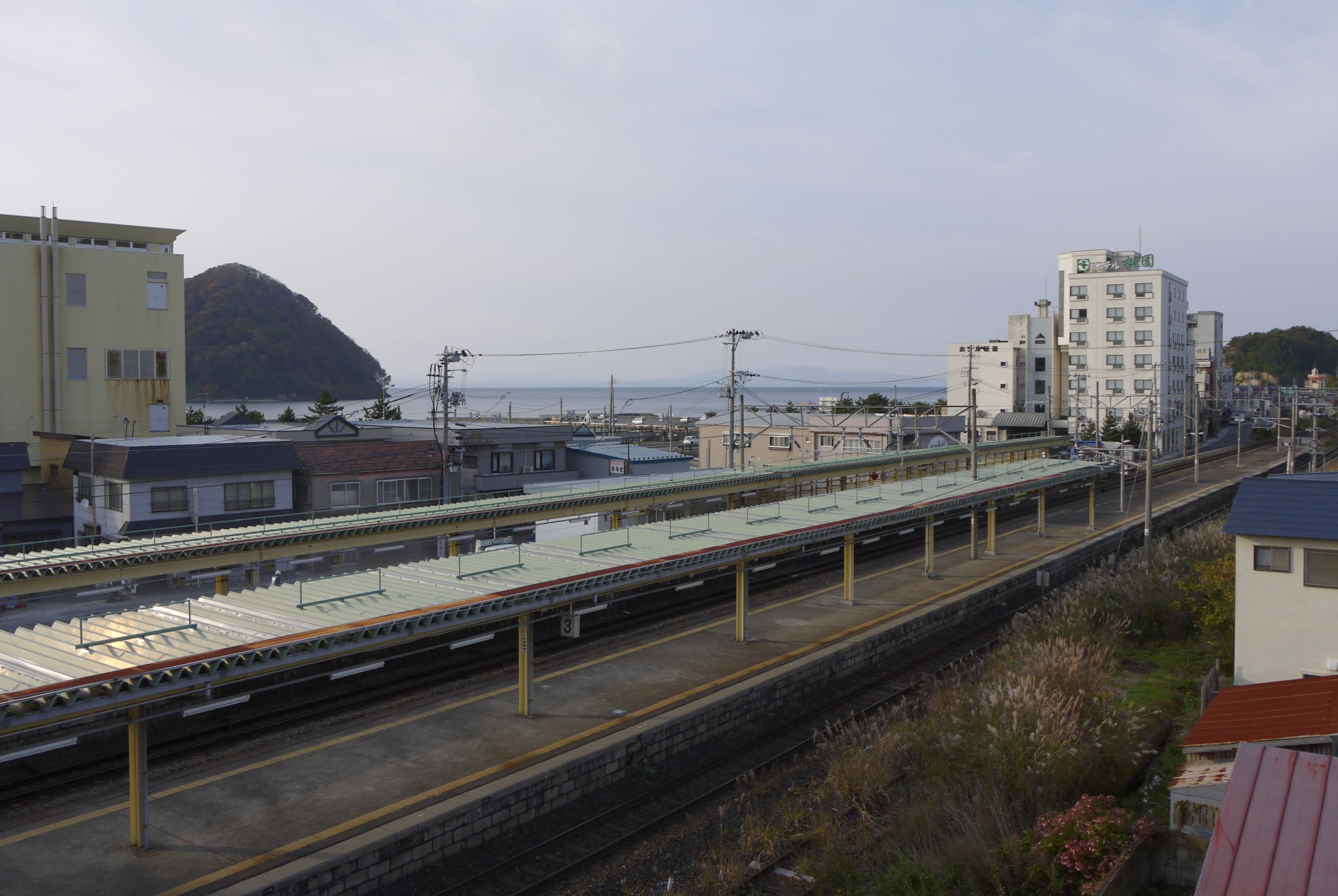 浅虫温泉駅（撮影当時はJR東日本・東北本線の駅）